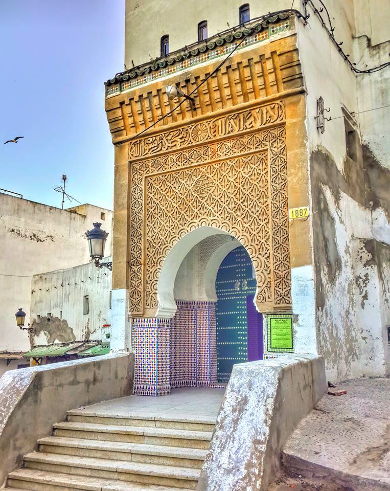 الزاوية الحراقية ، من اقل معالم مدينة تطوان ، كانت قديما مكانا للعبادة مثل المسجد